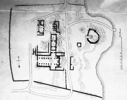 Planritning. Foto efter ritning i ATA.